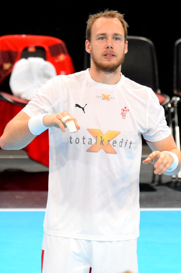 Le 10 janvier 2016 lors du match France / Danemark durant la Golden League à l'AccorHotels Arena (Paris).